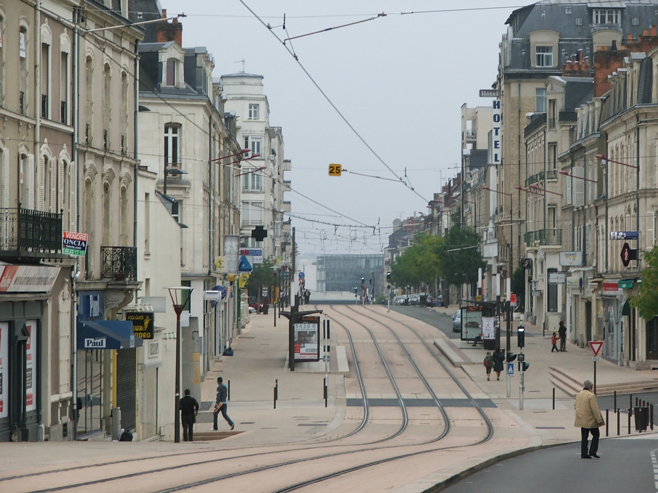 Vue de l'avenue du général leclerc depuis la place de la préfecture.